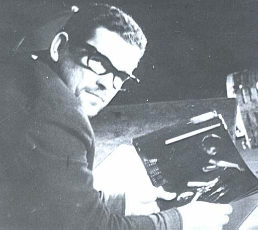 Проф. Константин Джидров Експериментален теарър '64